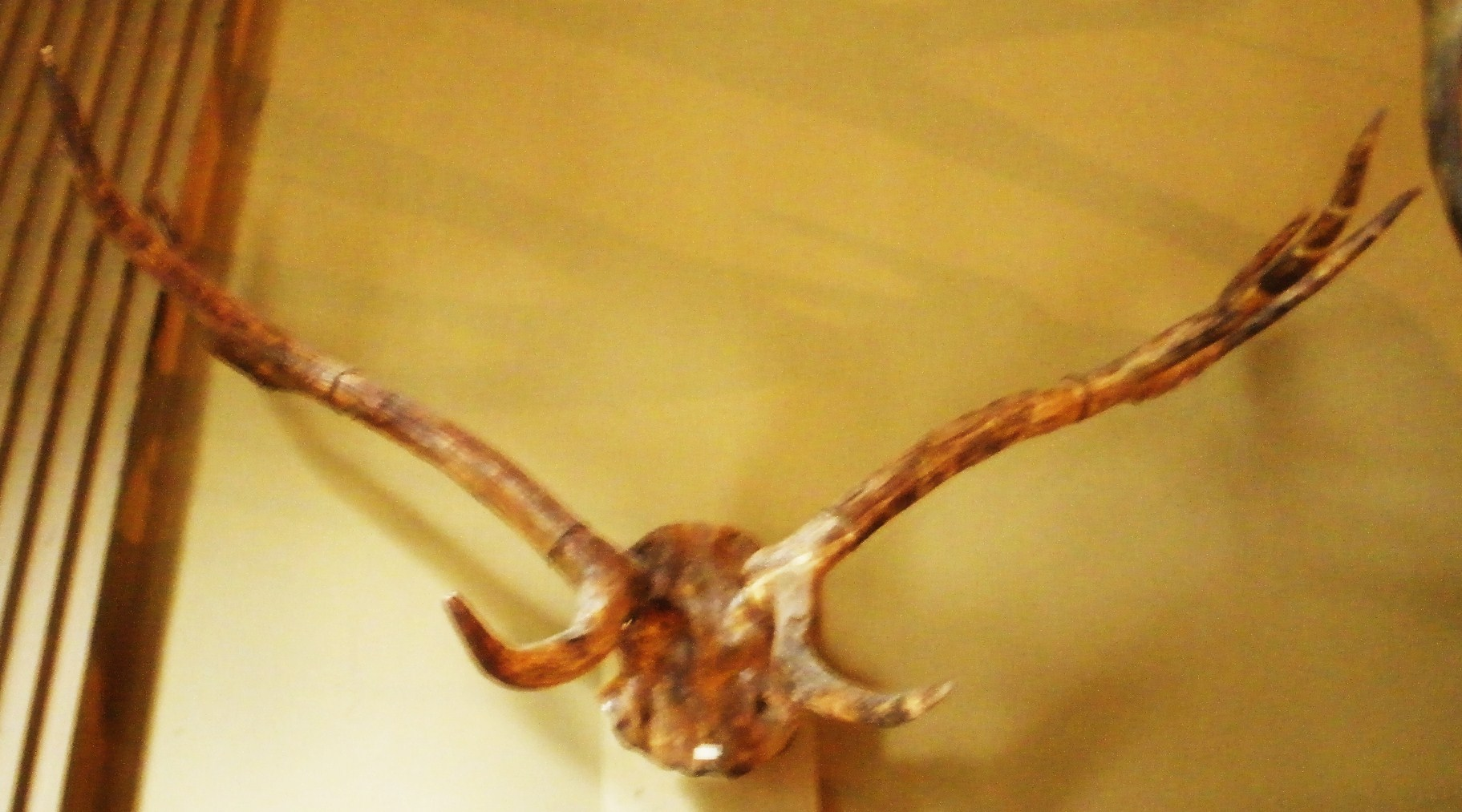 Fossil of Eucladoceros, an extinct deer- Took the photo at Teylers Museum, Haarlem